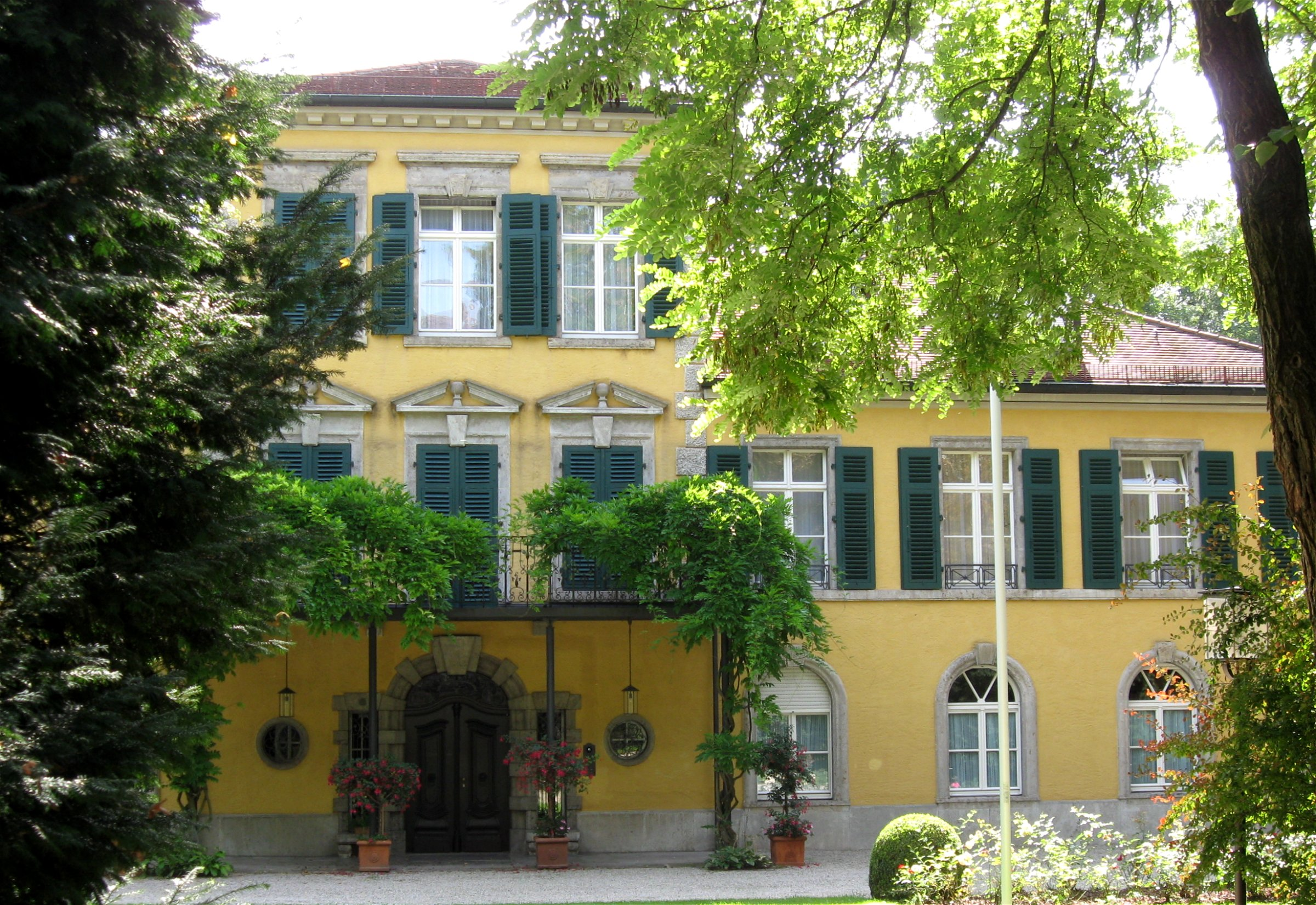 Schloss Suresnes, München-Schwabing